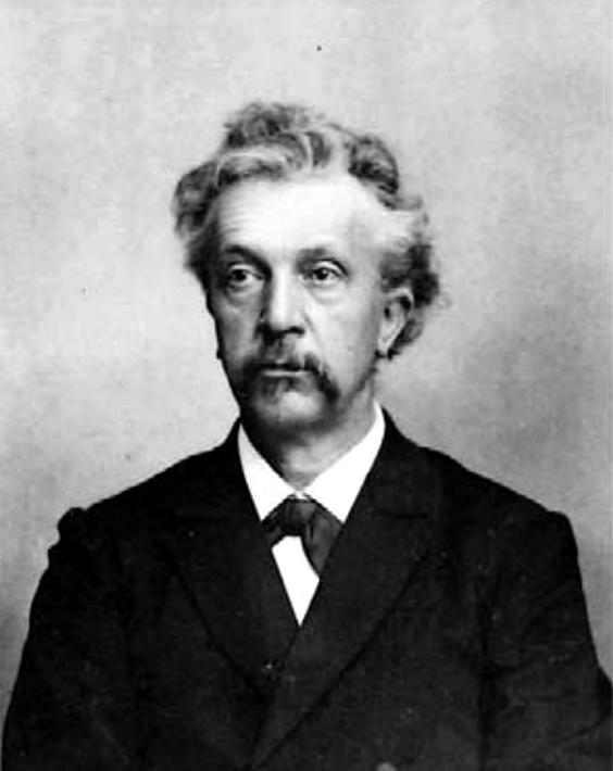 J.A. van der Kloes